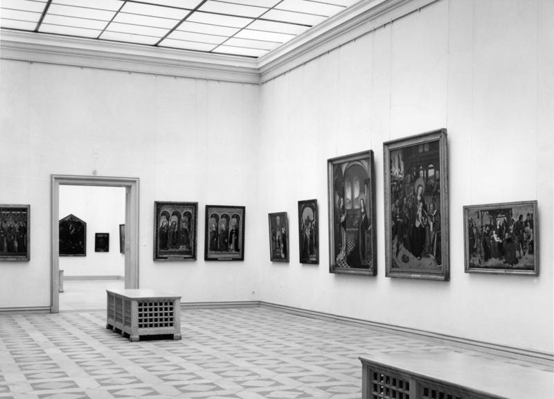 Germanisches Nationalmuseum in Nürnberg Gemäldegalerie mit Raum der Kölner Schule